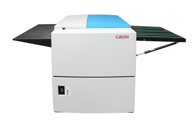 Computer to plate (CTP) de la marque CRON